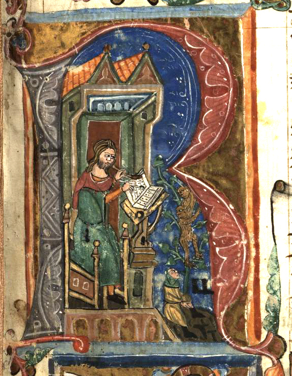 Rudolf von Ems: Weltchronik. Böhmen (Prag), 3. Viertel 14. Jahrhundert. Hochschul- und Landesbibliothek Fulda, Aa 88. Bildbeschreibung nach Martin Roland. Titelinitiale, fol. 1r